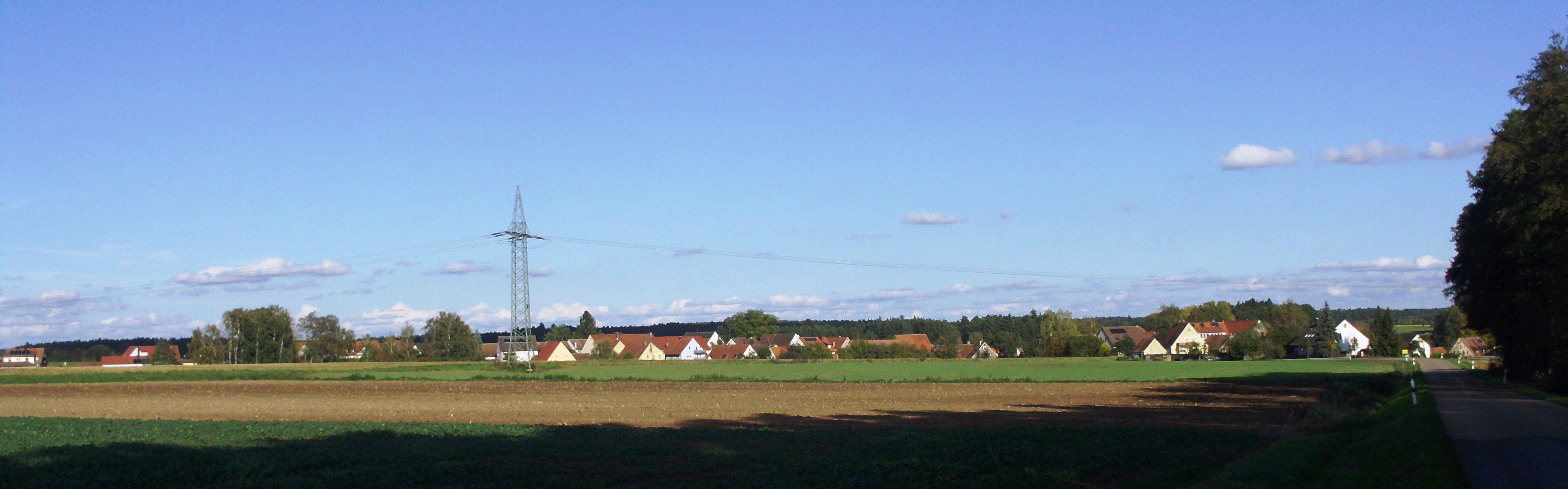 Weiherschneidbach, Ortsteil von Weidenbach (Mittelfranken)